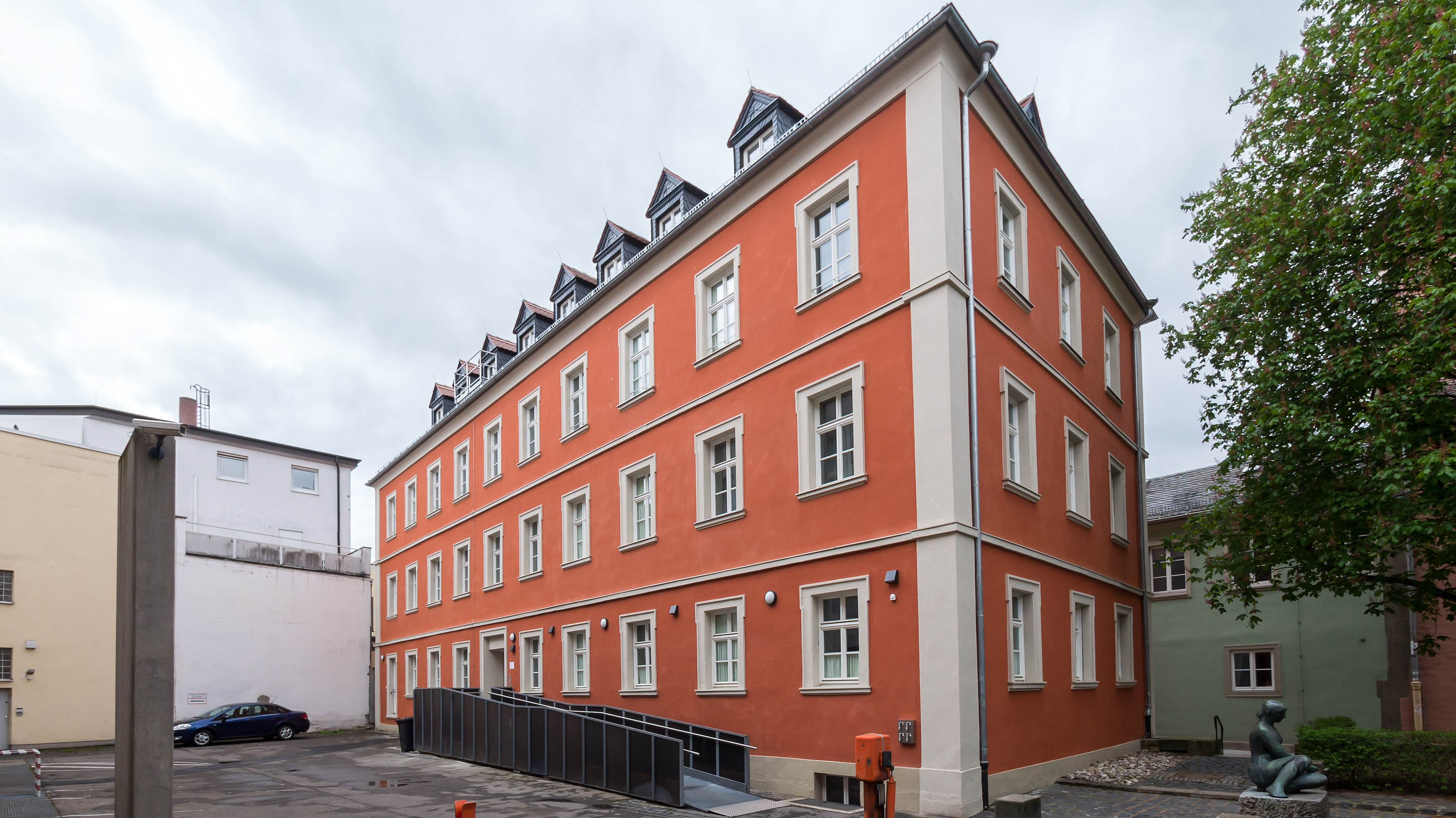 Würzburg Klinikstraße 6 Wohnhaus, ehemaliges Mathematisches Institut der Universität , Barock, spätes 18. Jahrhundert, Wiederaufbau 1953-54 III Akt.Nr.D-6-63-000-272